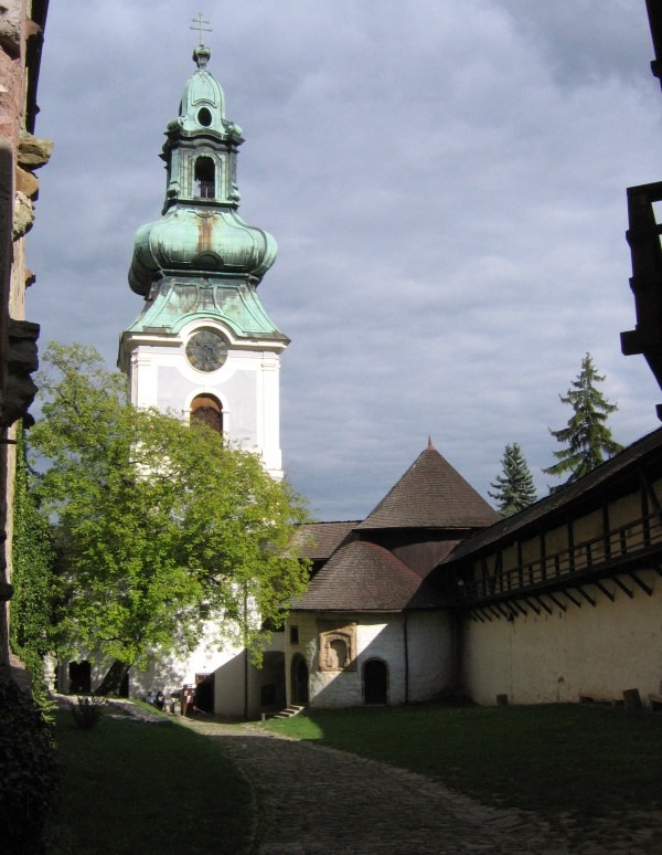 Banská Štiavnica, Starý zámokVstupná časť do areálu hradu (vonkajšie nádvorie). Kaplnka Sv. Michala sa po prestavbe stala súčasťou opevnenia